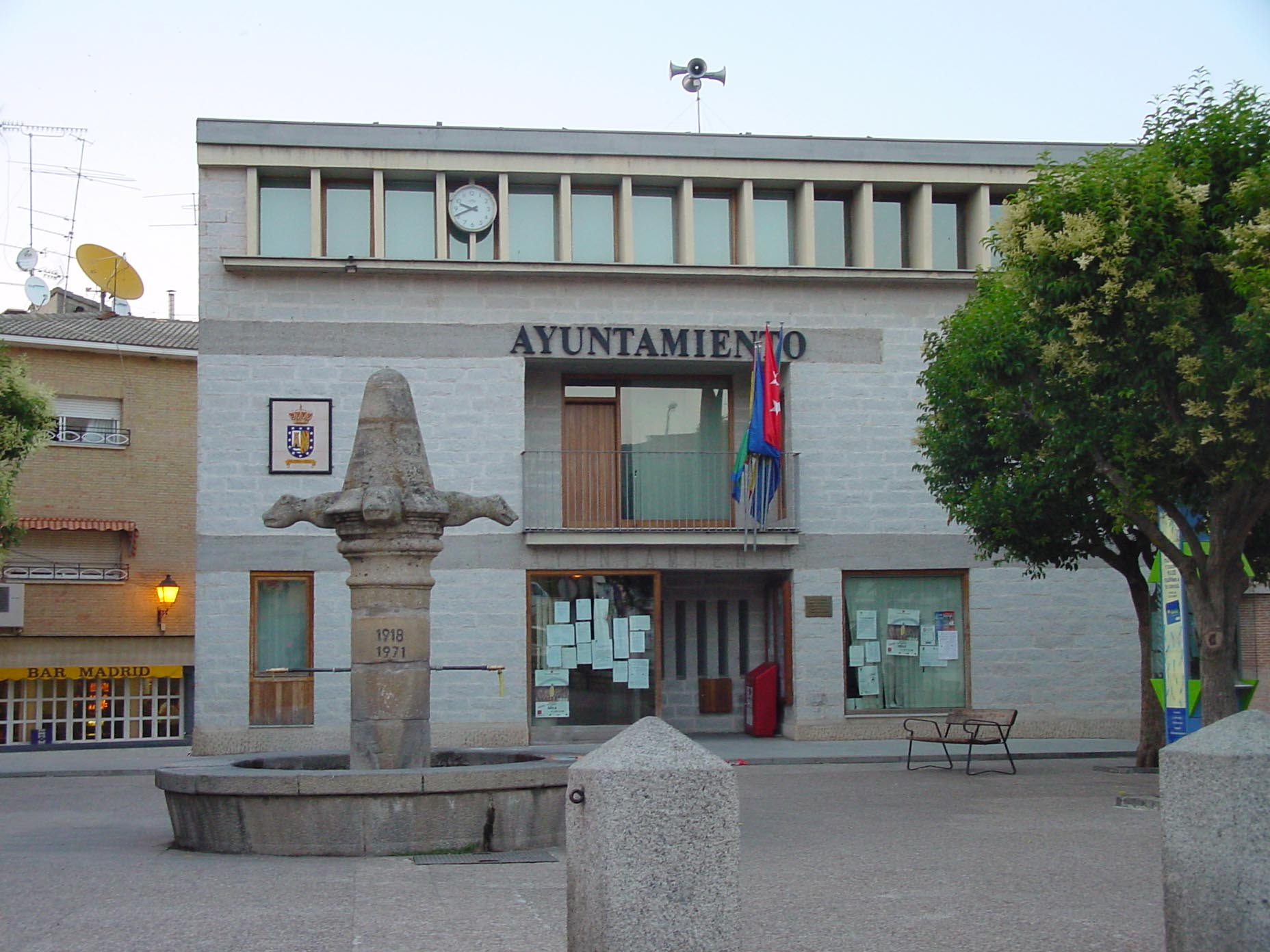 Ayuntamiento y fuente en Pelayos de la Presa.